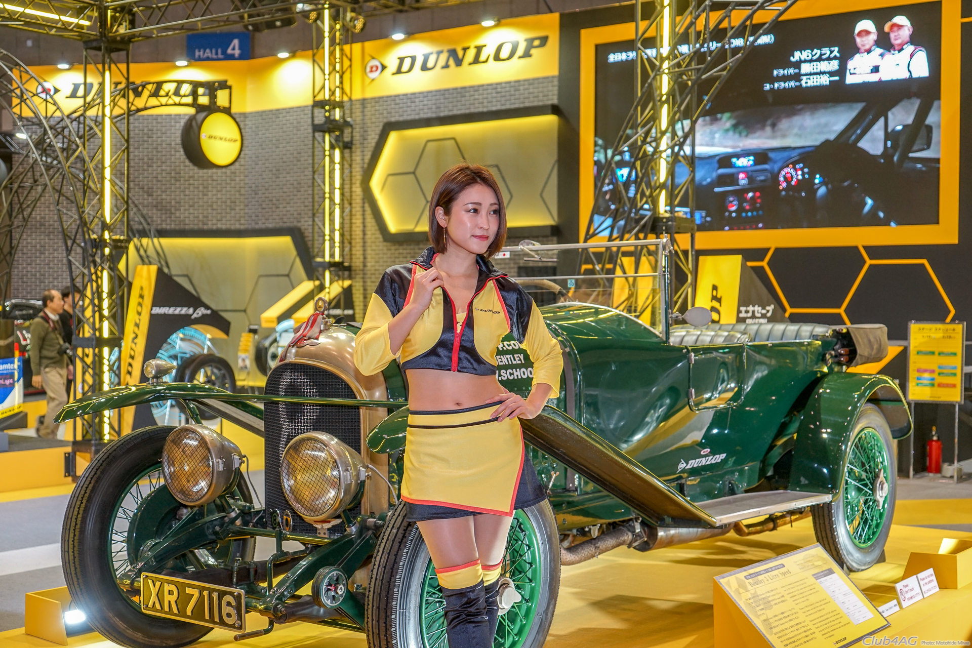 Tokyo Auto Salon 2019